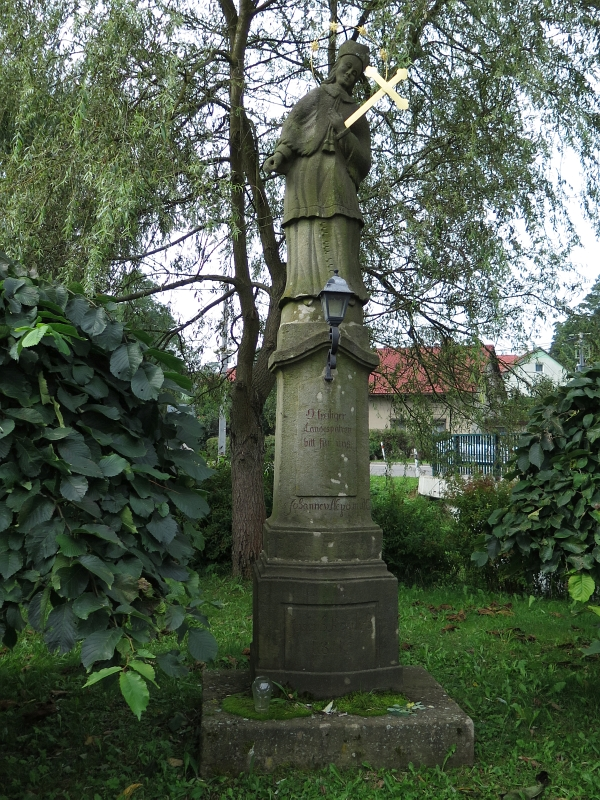 Sloup se sochou svatého Jana Nepomuckého, Horní Vernéřovice.